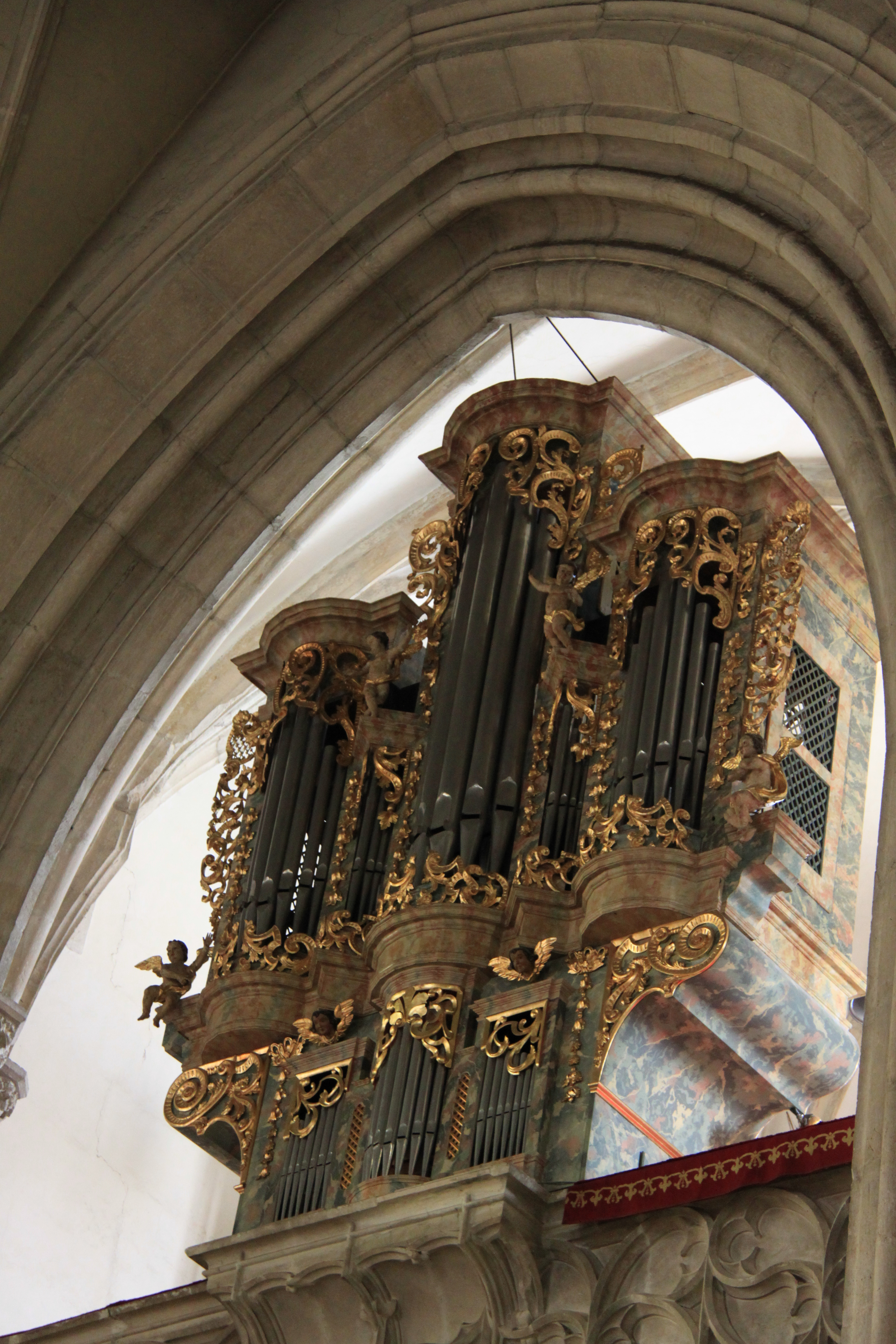 Cluj-Napoca - Iunie 2010